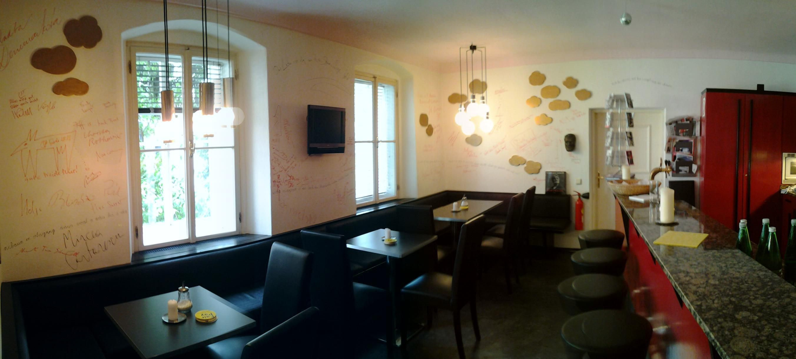 Das "h. c. Café", nach H. C. Artmann benannt, im Salzburger Literaturhaus; Gestaltung von Wolfgang Eibl, Wandbereich mit Wolken, Decke in der Farbe Rosa